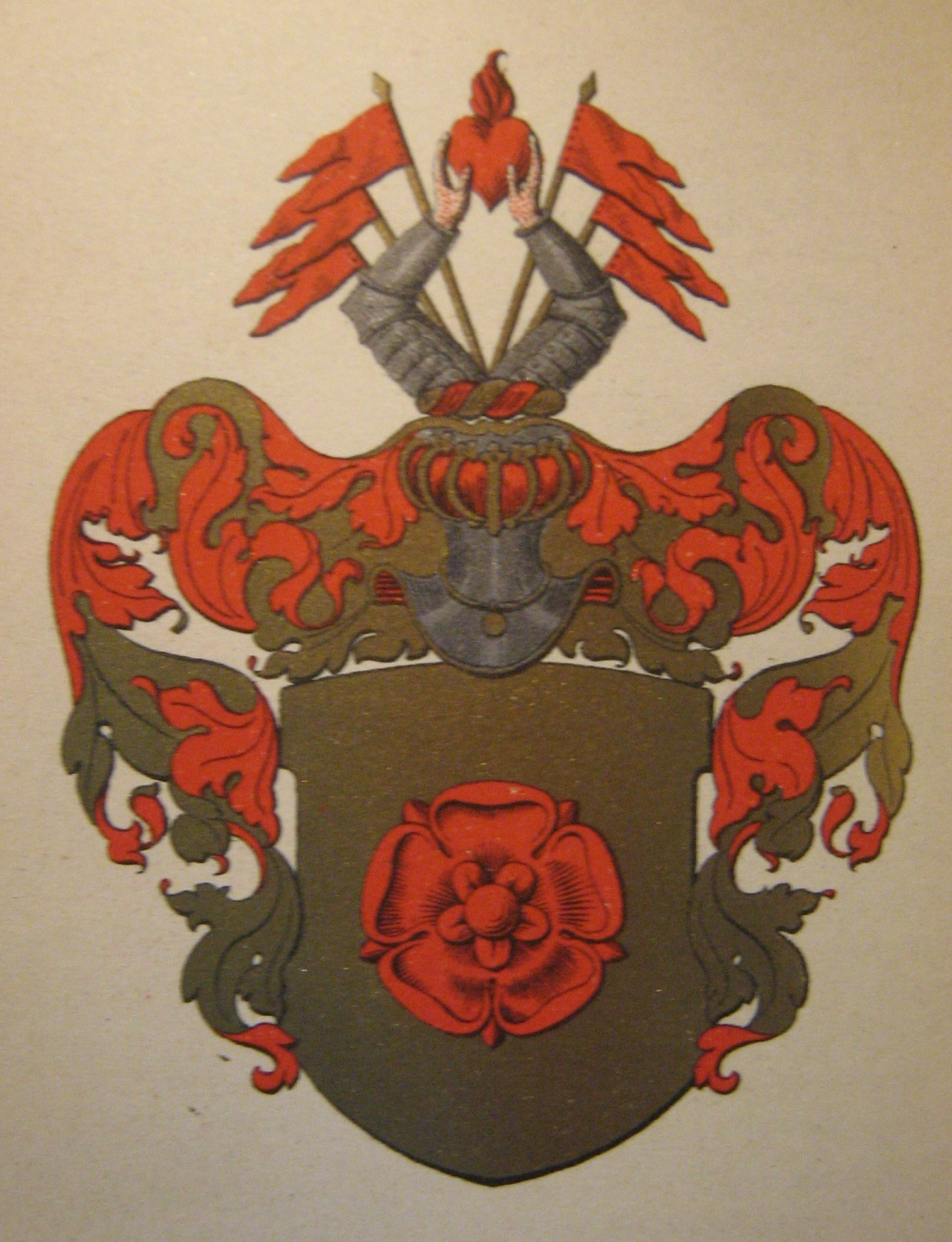 Adliga ätten Roos af Hjälmsäters vapen